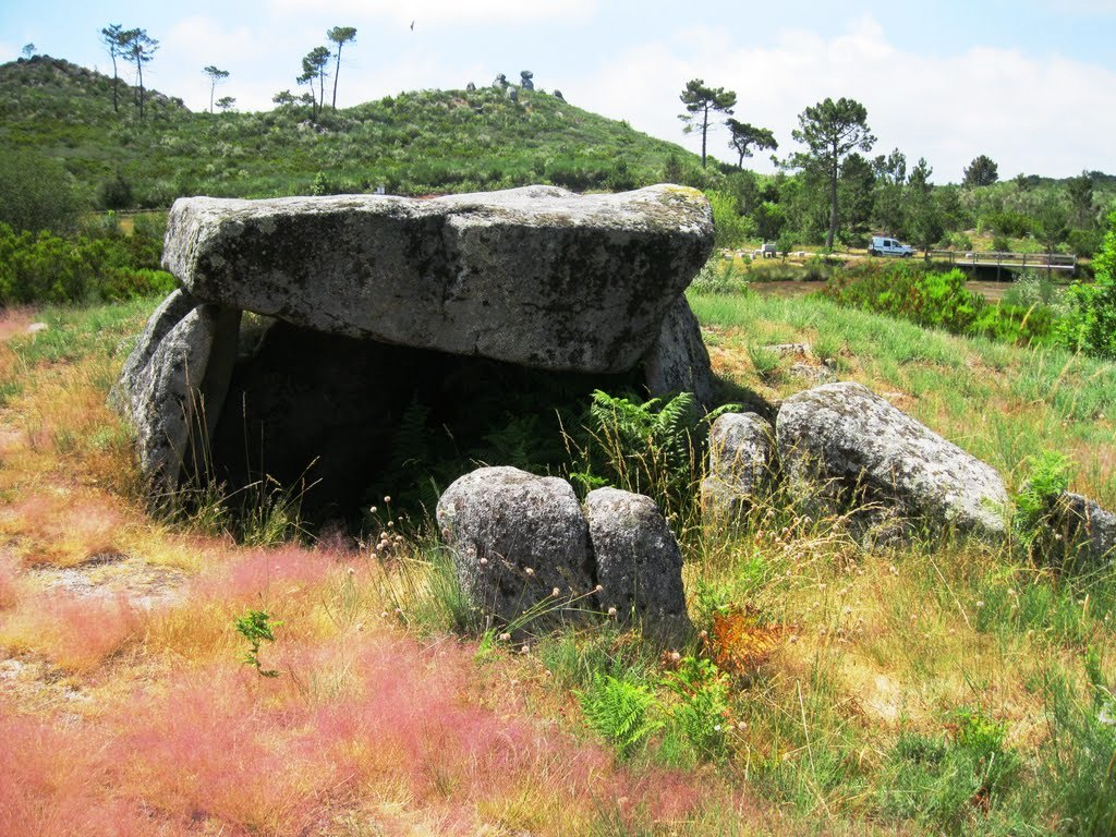 Num dos mais altos locais desta bela serra, encontra-se este belo dólmen, nas imediações de um pitoresco lago artificial